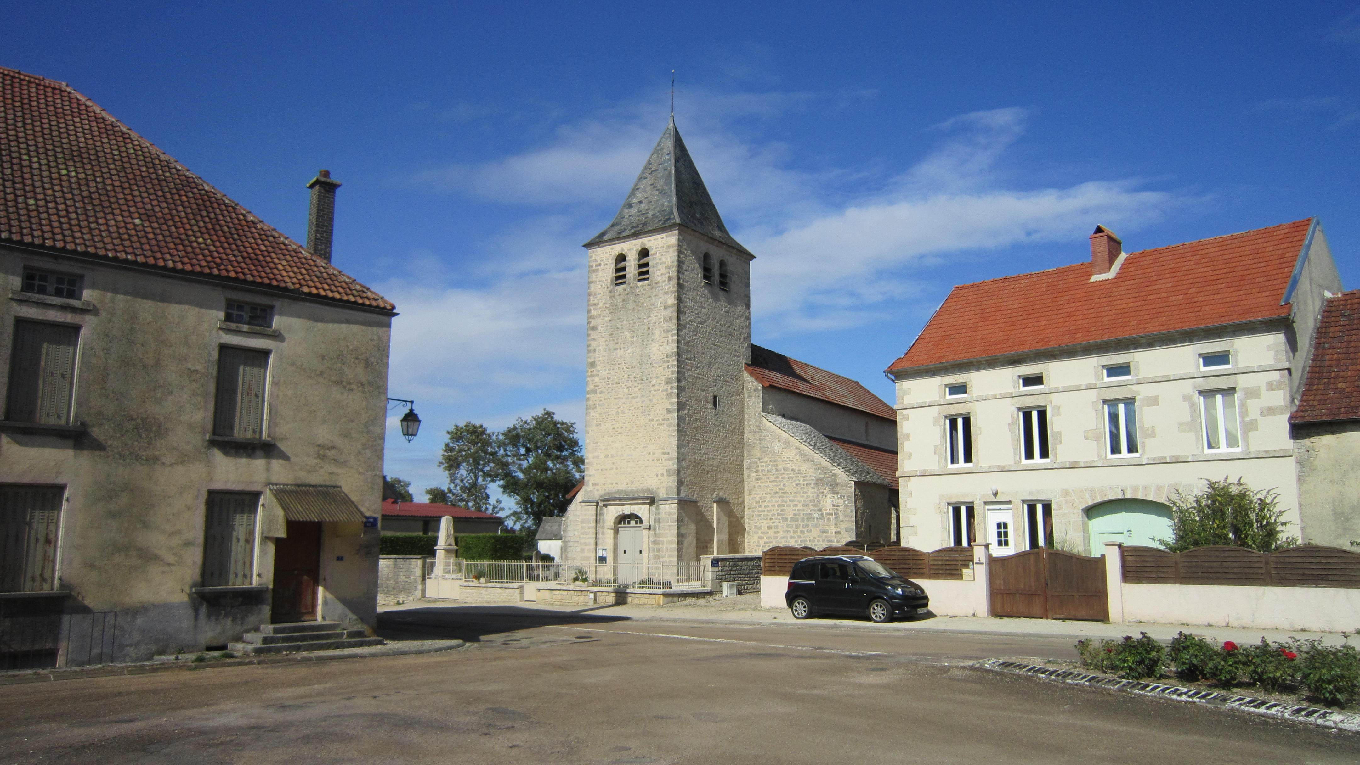 L'église et la place centrale de Marcenay (Côte-d'Or)